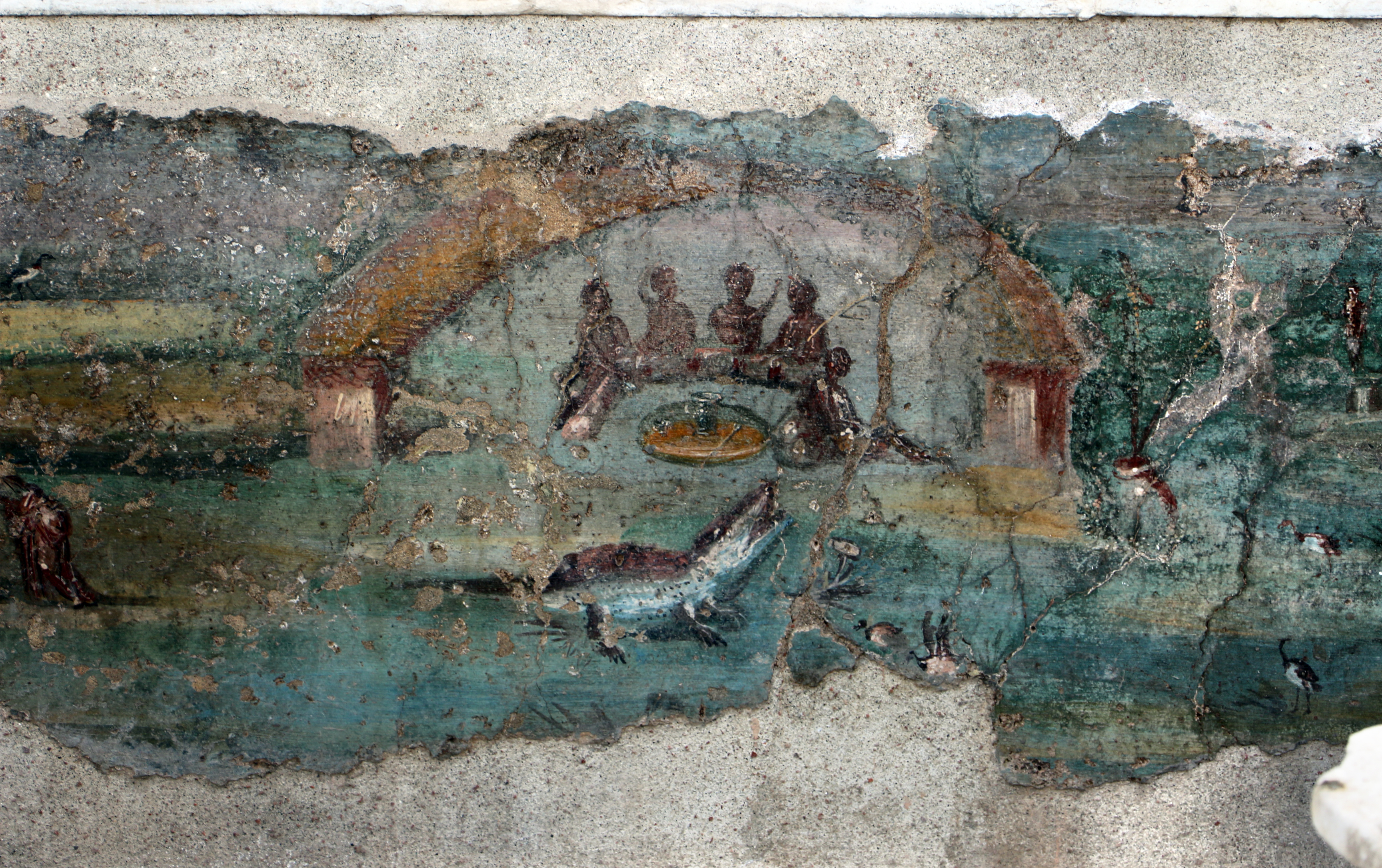 Casa dell'Efebo This is a photo of a monument which is part of cultural heritage of Italy.